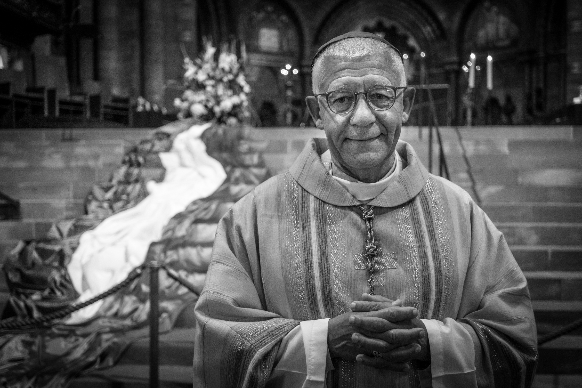 Mgr Luc Ravel par Claude Truong-Ngoc